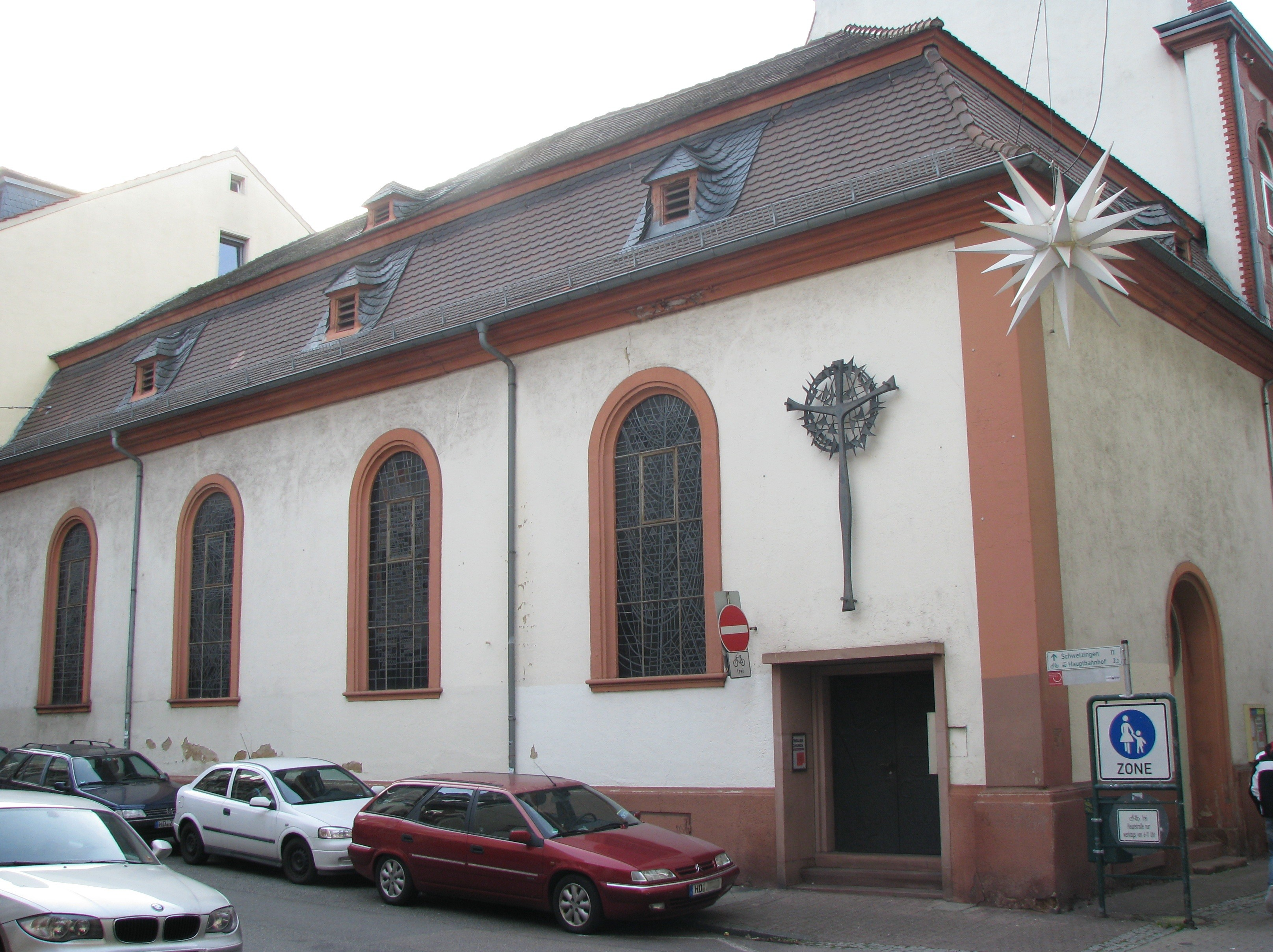 Die Erlöserkirche in der Heidelberger Altstadt, erbaut 1724